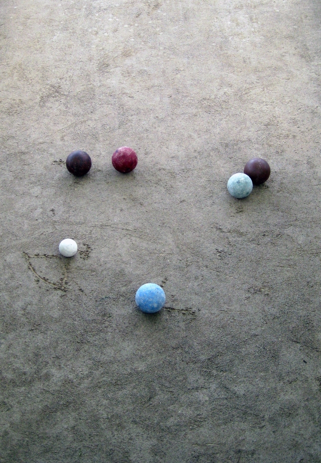 Boćanje na podvežičkom jogu u Rijeci